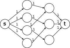 מציאת שידוך מקסימום בגרף דו צדדי באמצעות רשת זרימה, מעשה ידי, בעזרת התוכנה Dia.